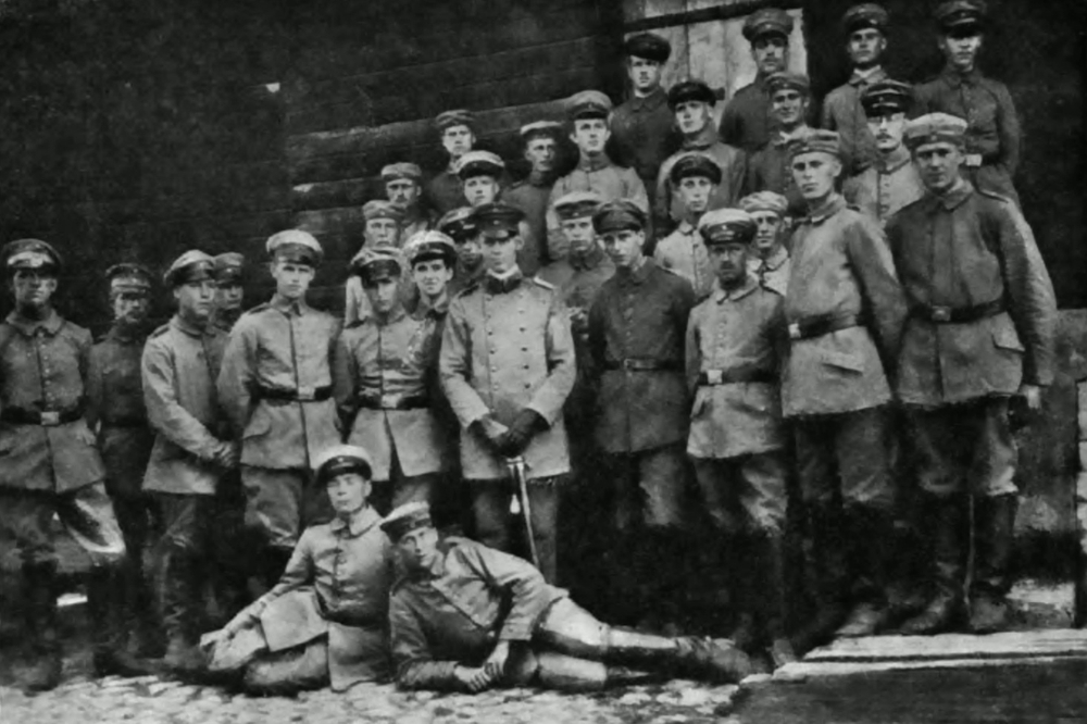 Reitabteilung des Königlich-Preußische Jäger-Bataillon Nr. 27.